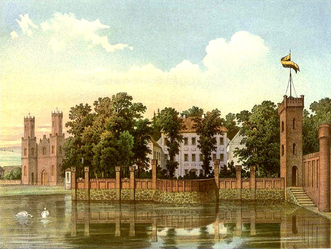 Schloss Krockow, Kreis Neustadt in Westpreußen, Provinz Westpreußen, Lithografie aus dem 19. Jahrhundert